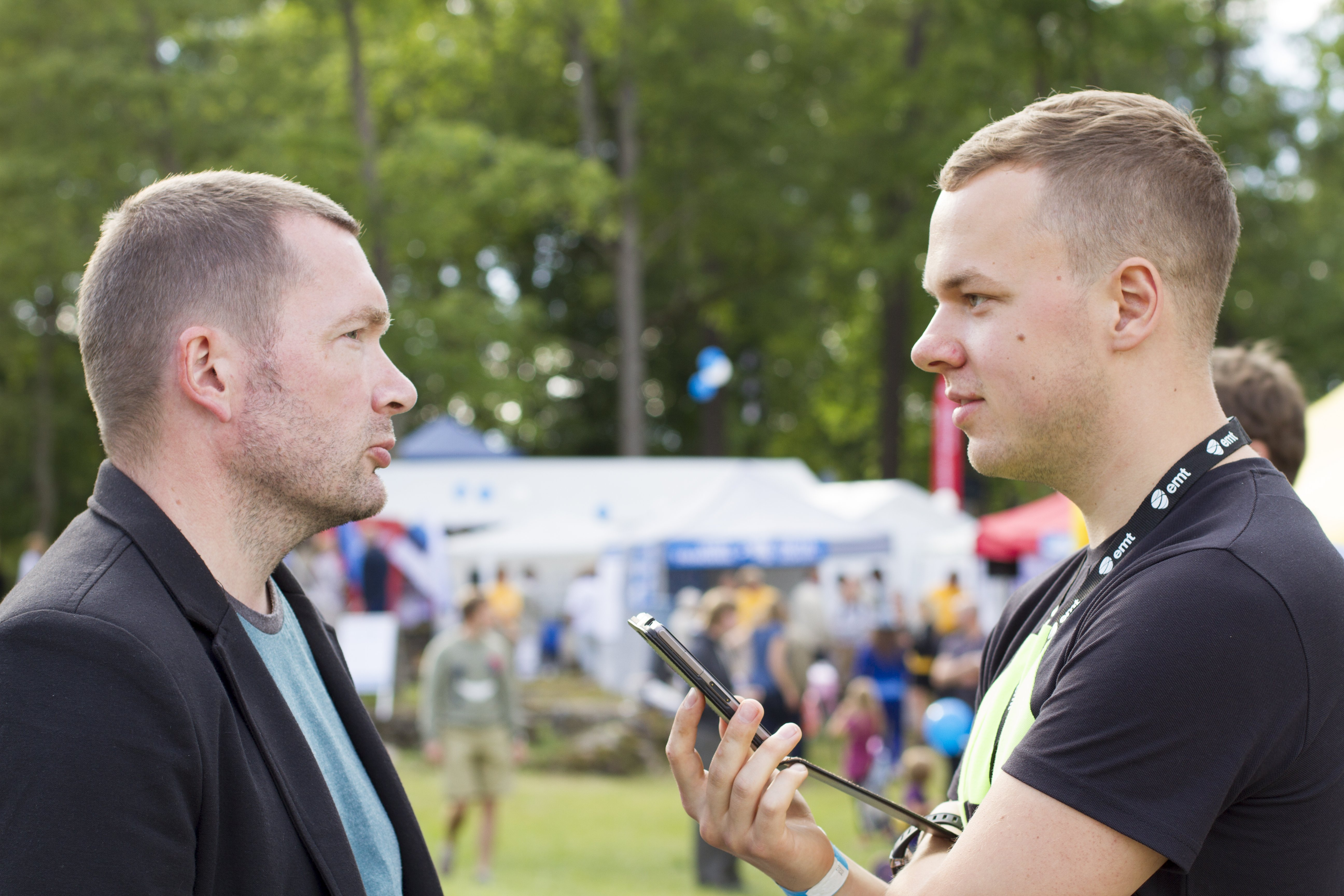 Arvamusfestival 2014